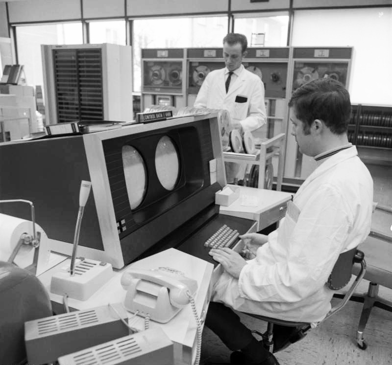 Technische Hochschule Aachen Rechenzentrum